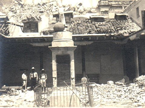 Ruinas del Colegio de Infantes en la Ciudad de Guatemala en 1918